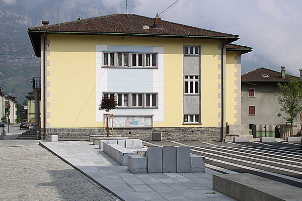 Casa comunale di Pollegio